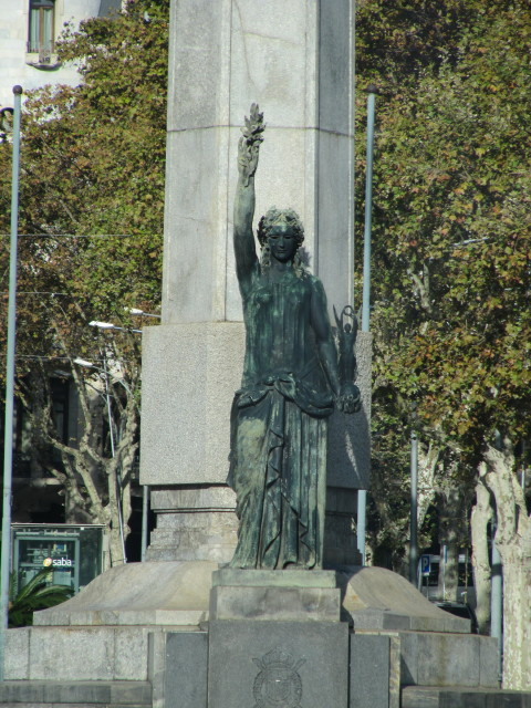 Victoria, escultura de Frederic Marès situada hasta 2011 en la plaza Juan Carlos I de Barcelona.